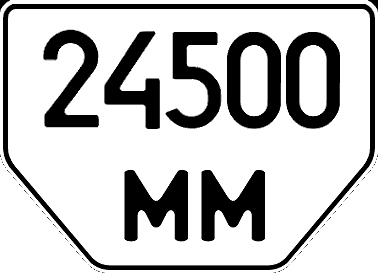 Тракторный номер Украины, 1995-2004 годы